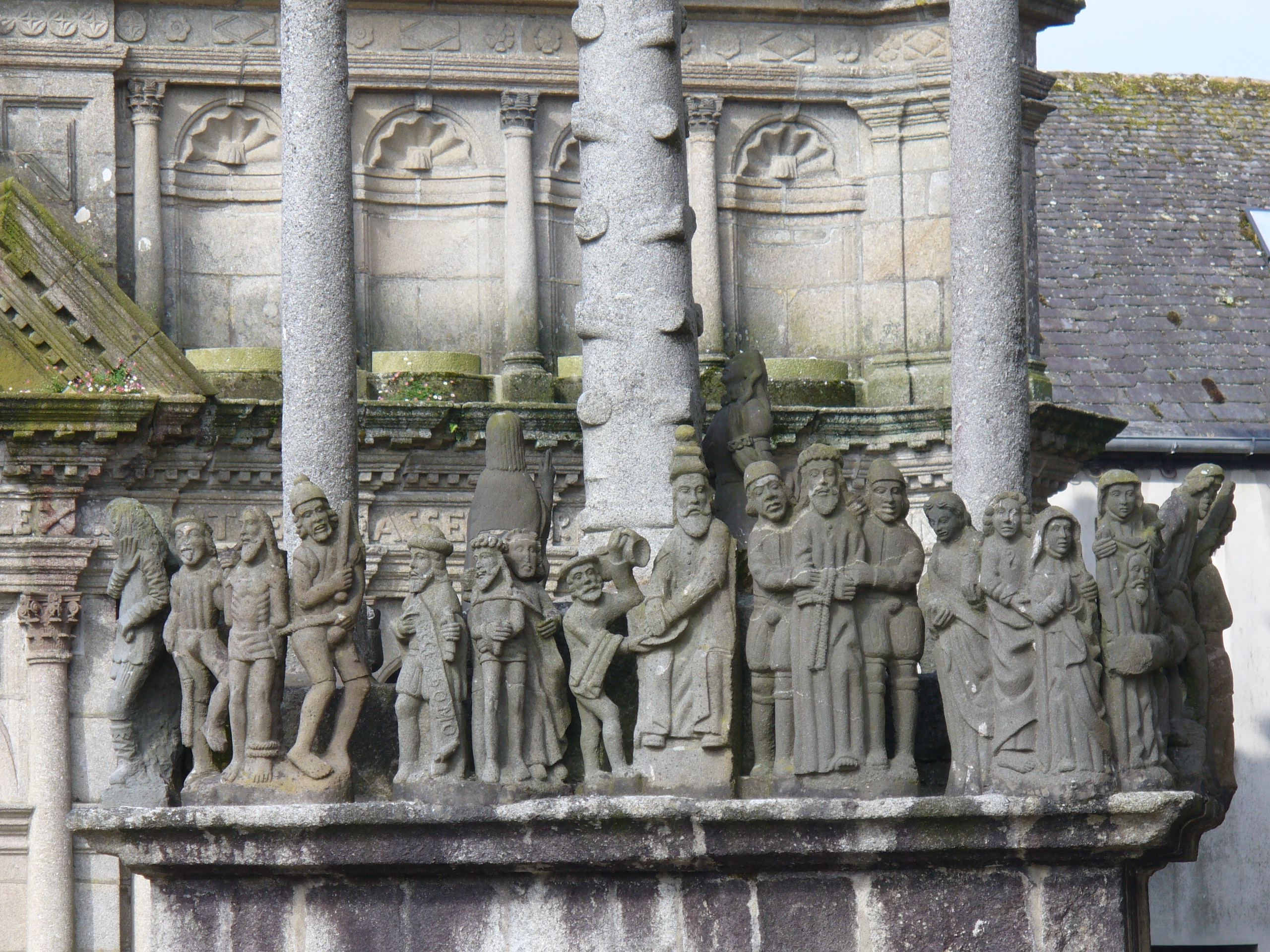 Kalvarienberg(calvaire-1610)-Saint Thegonnec-Steinfiguren lassen erkennen was sie fühlen,ob sie glücklich,leidend,böse sind oder etwas im Schilde führen.Biblische Szenen vermischt mit lokalgeschichtlichen Ereignissen